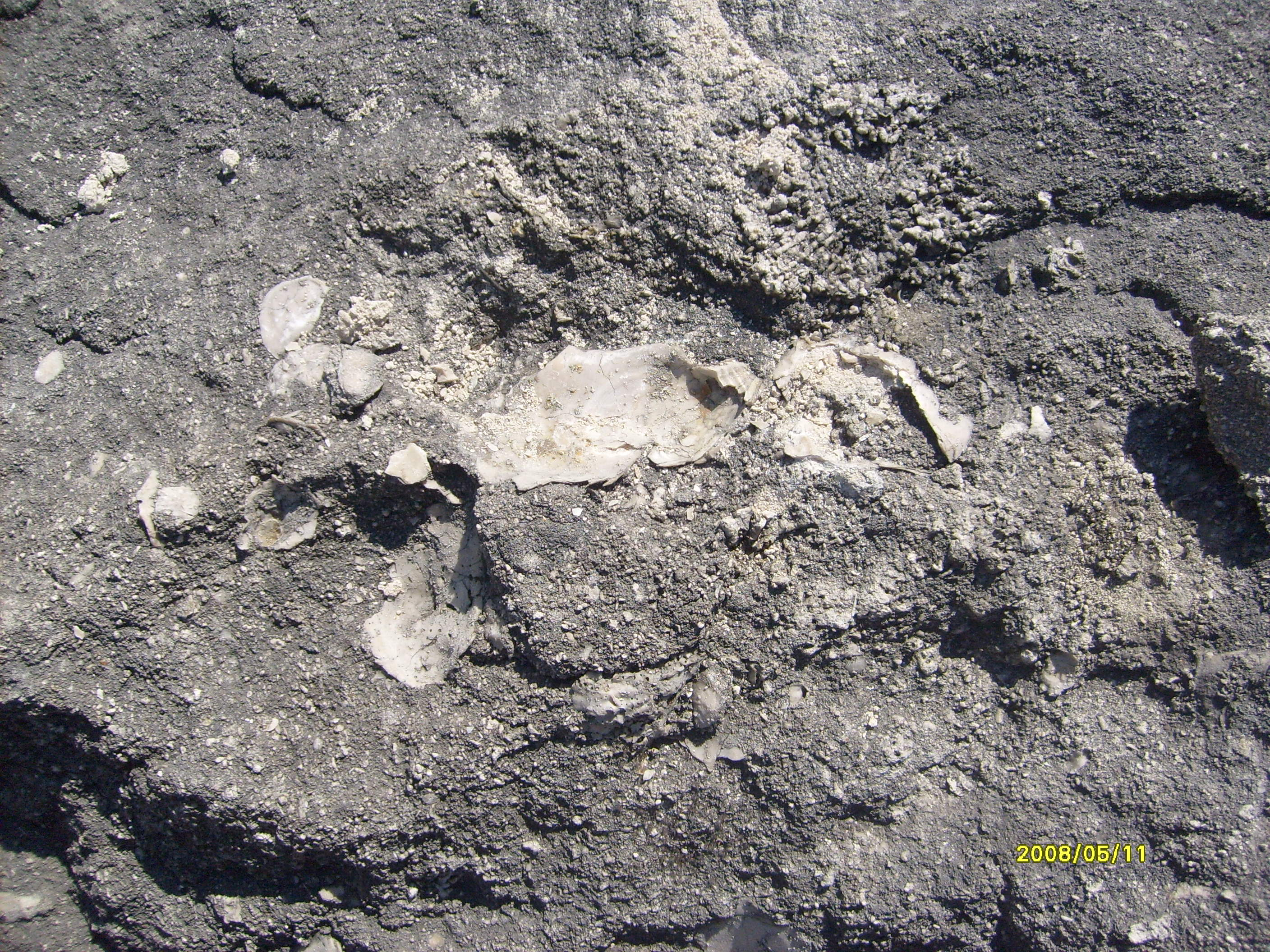 Fertőrákosi lezárt kőfejtő: lajtamészkő ősmaradványokkal (lithothamniumgumó és ostreahéj)